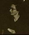 la classe di composizione Paul Dukas nel 1929 tratto da e riportante la seguente scritta